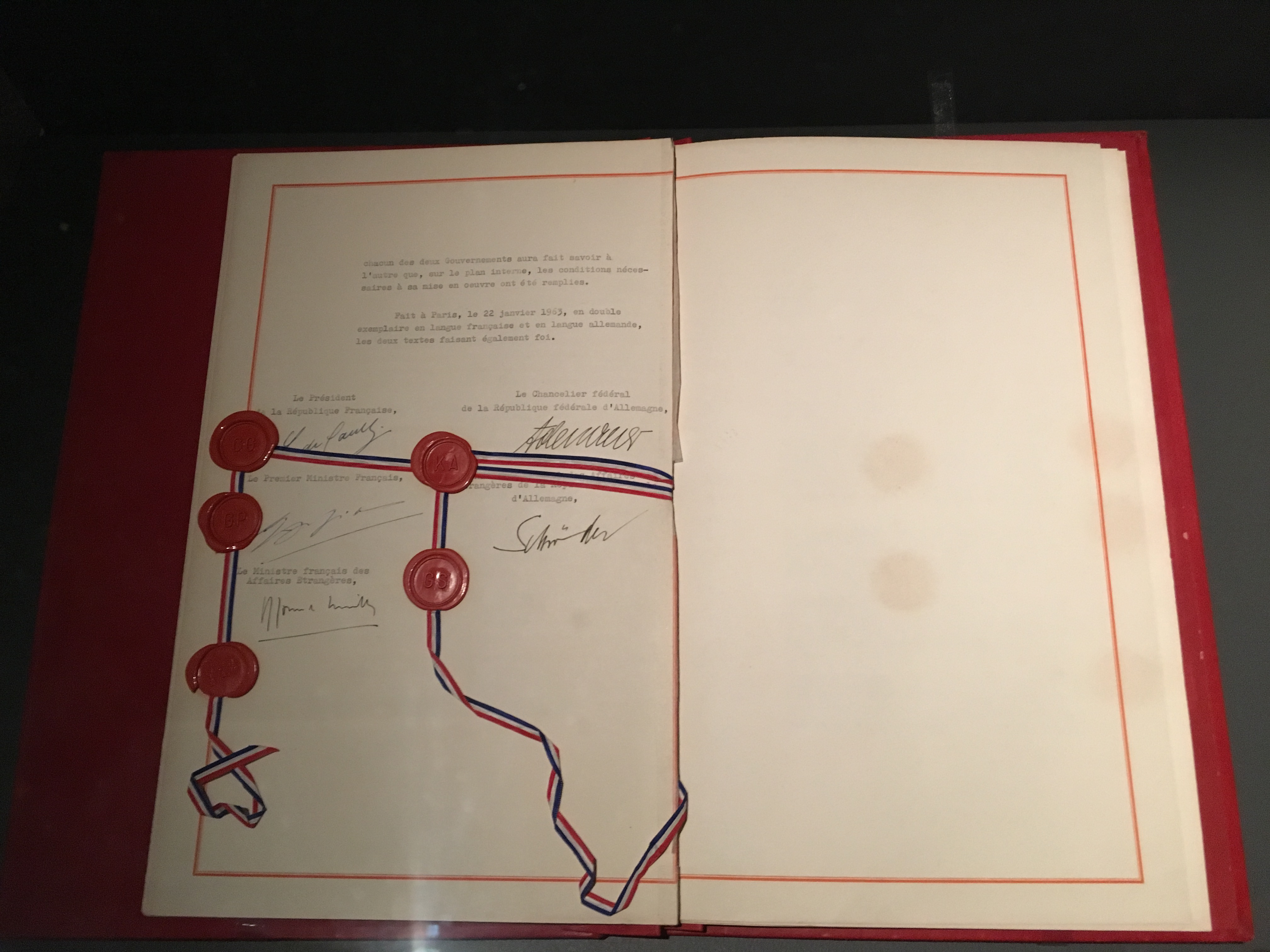 Traité entre la République française et la République fédérale d'Allemagne sur la coopération franco-allemande, dit traité de l'Elysée. Paris, 22 janvier 1963.